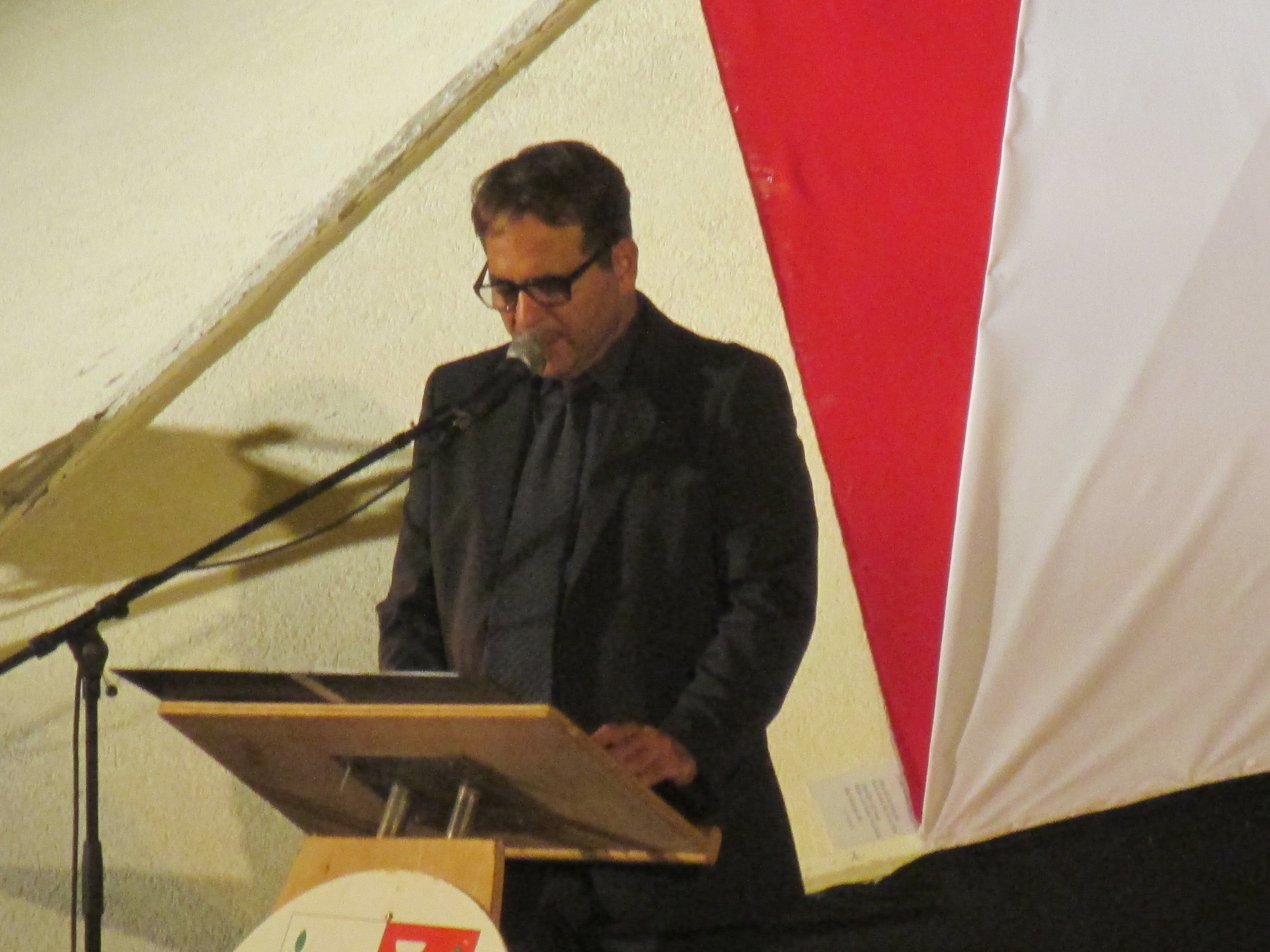 השדרן נעם גיל-אור בטקס אזכרה לחללי חיל הרפואה בחיפה